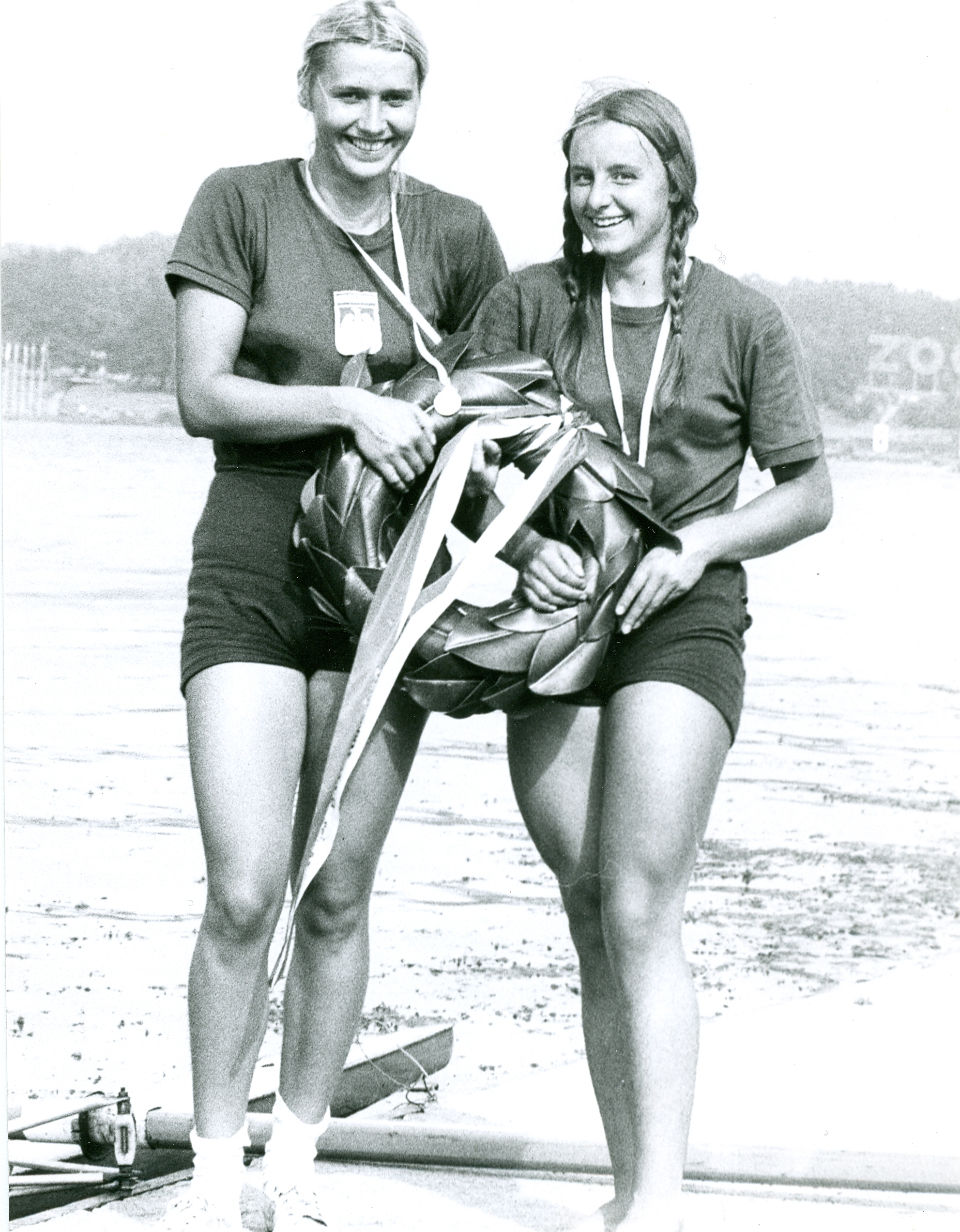 Anna Karbowniak, Małgorzata Kowalska Mistrzostwa Polski Sen. dwójka bez sternika